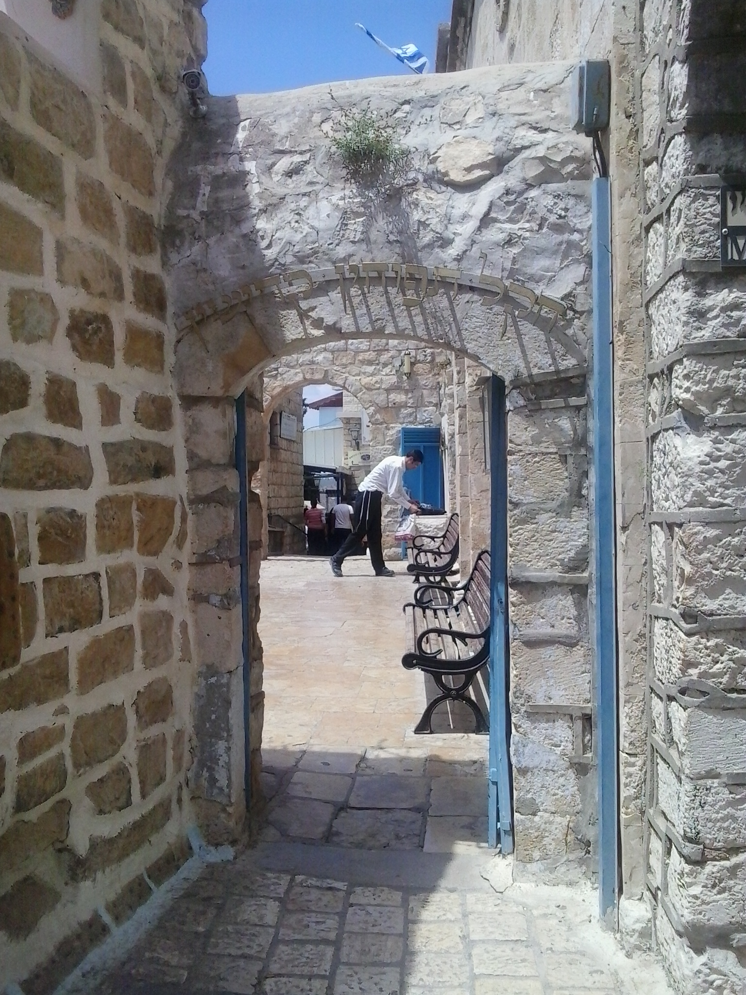 העיר העתיקה של צפת